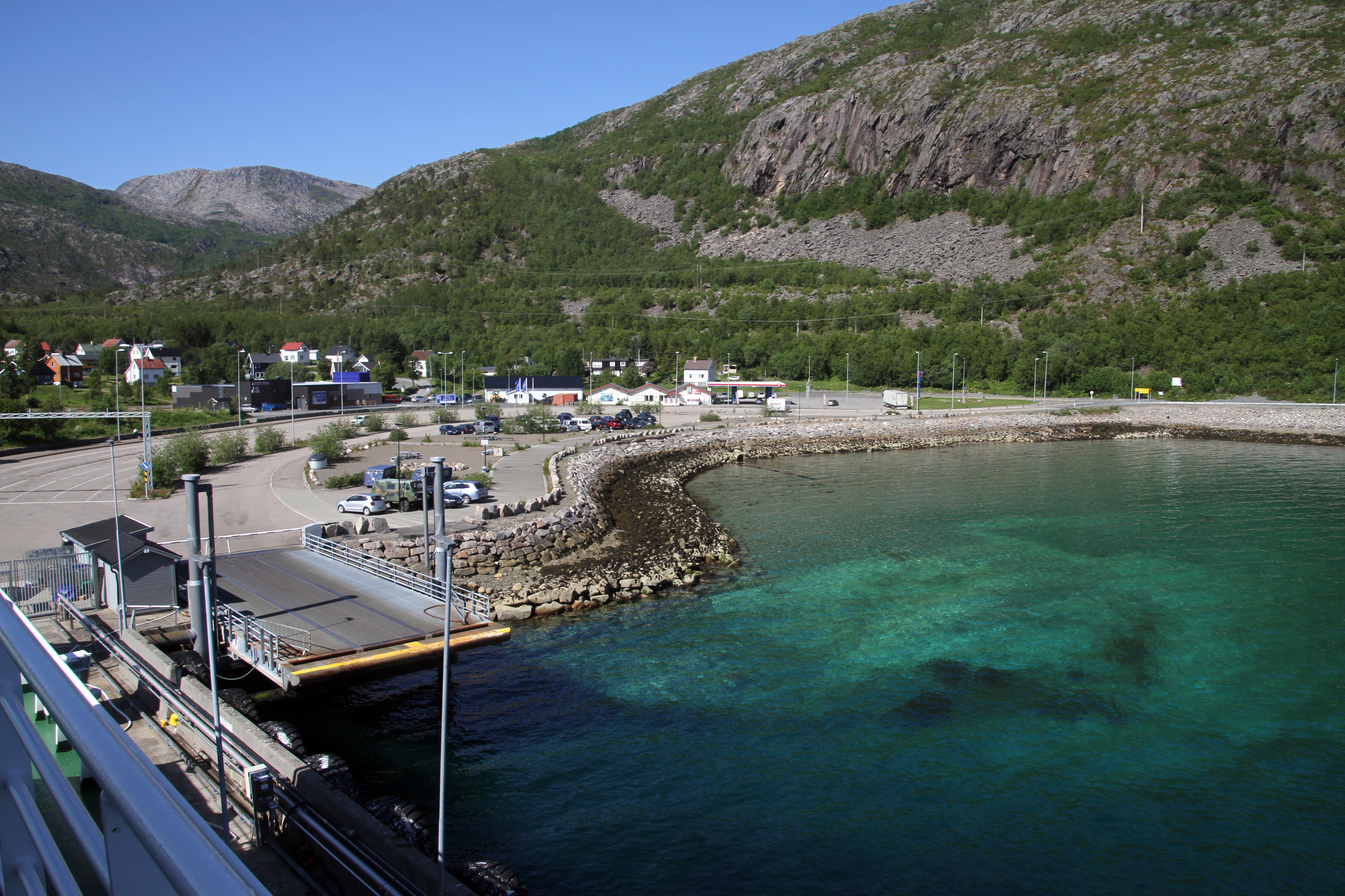 Lødingen, Hinnøya, Norwegen